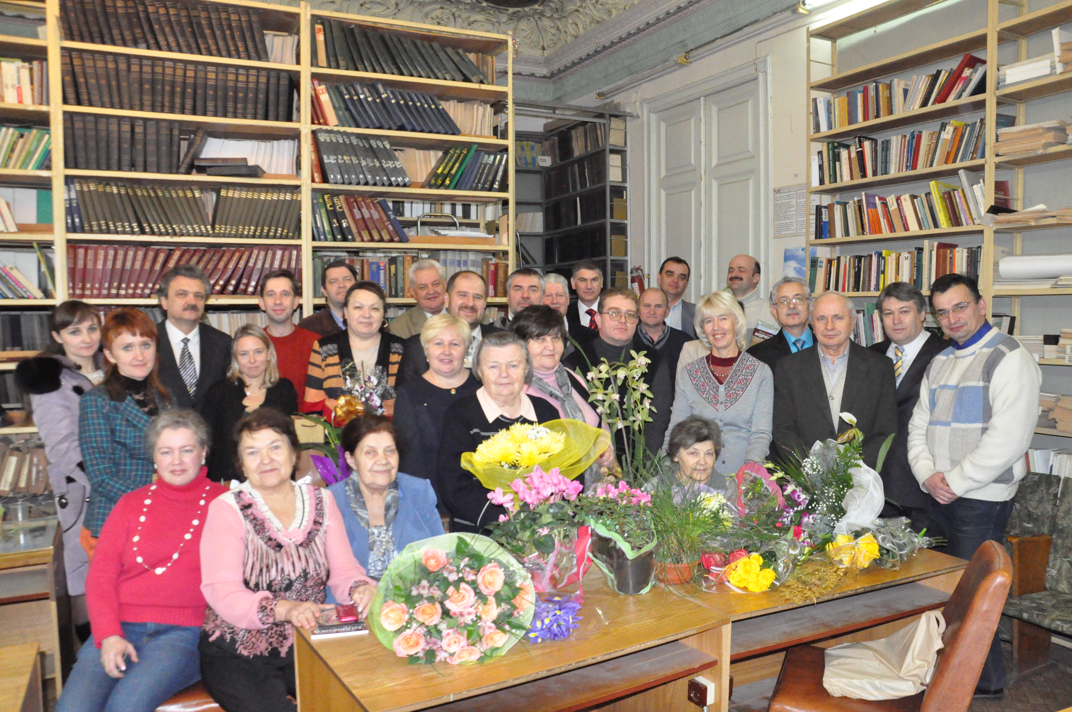 Тетяна Леонідівна Андрієнко з колегами